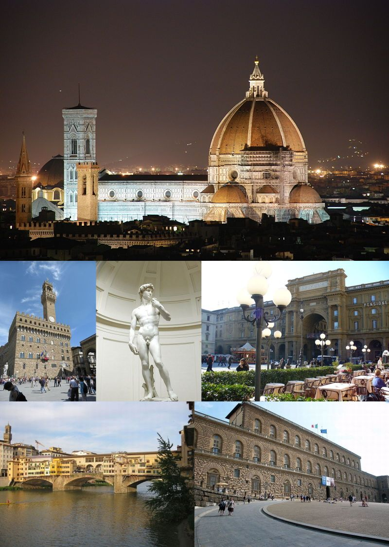 Florencia: zhora - Dóm Santa Maria del Fiore; v strede - zľava Palazzo Vecchio, Michelangelov David, Piazza della Repubblica; dole - Ponte Vecchio, Palazzo Pitti